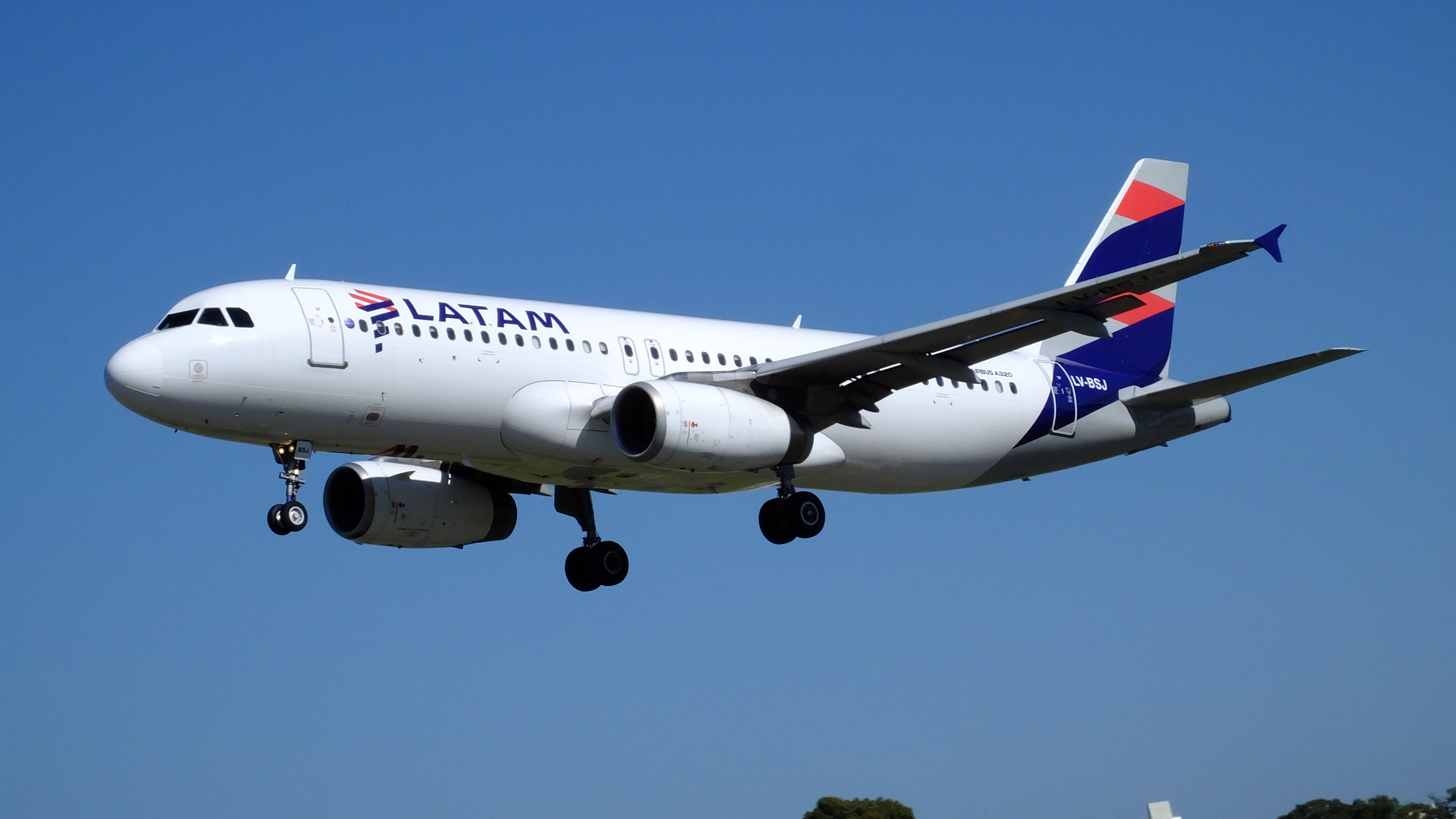 LATAM A320-233 LV-BSJ